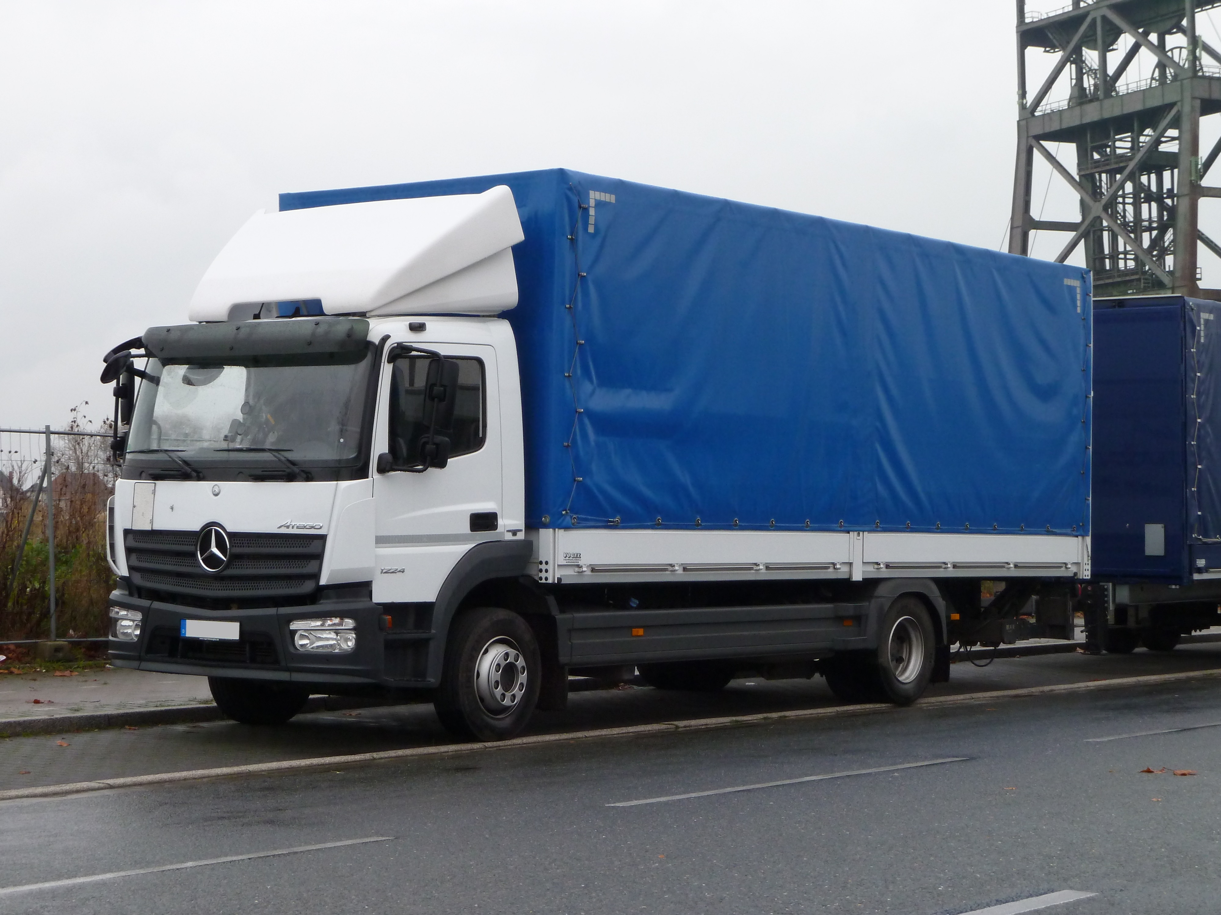 Mercedes Atego Modell Pritschen-Lkw mit Nahverkehrs-Fahrerhaus S